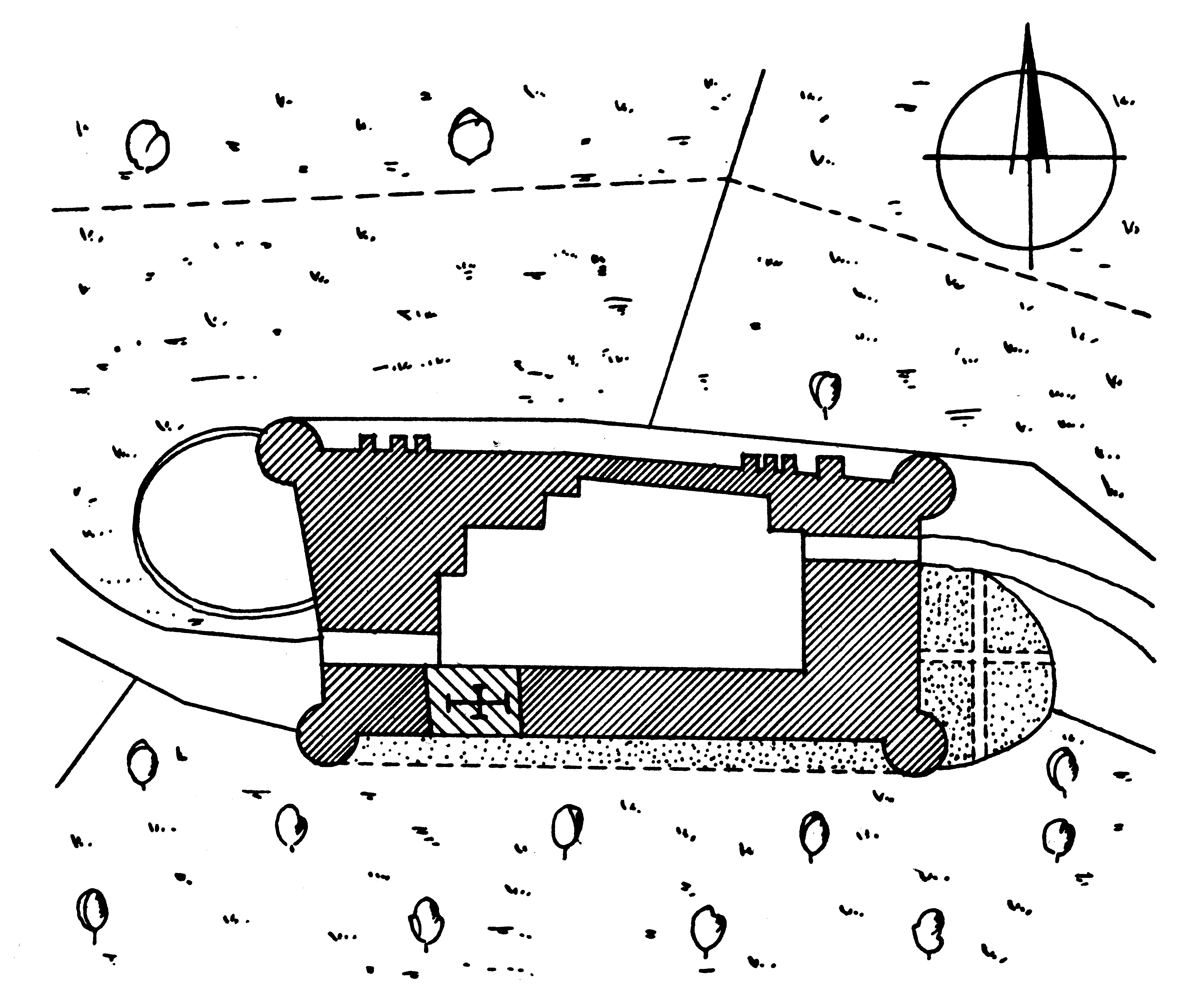 Grundriss des Schlosses Kronburg